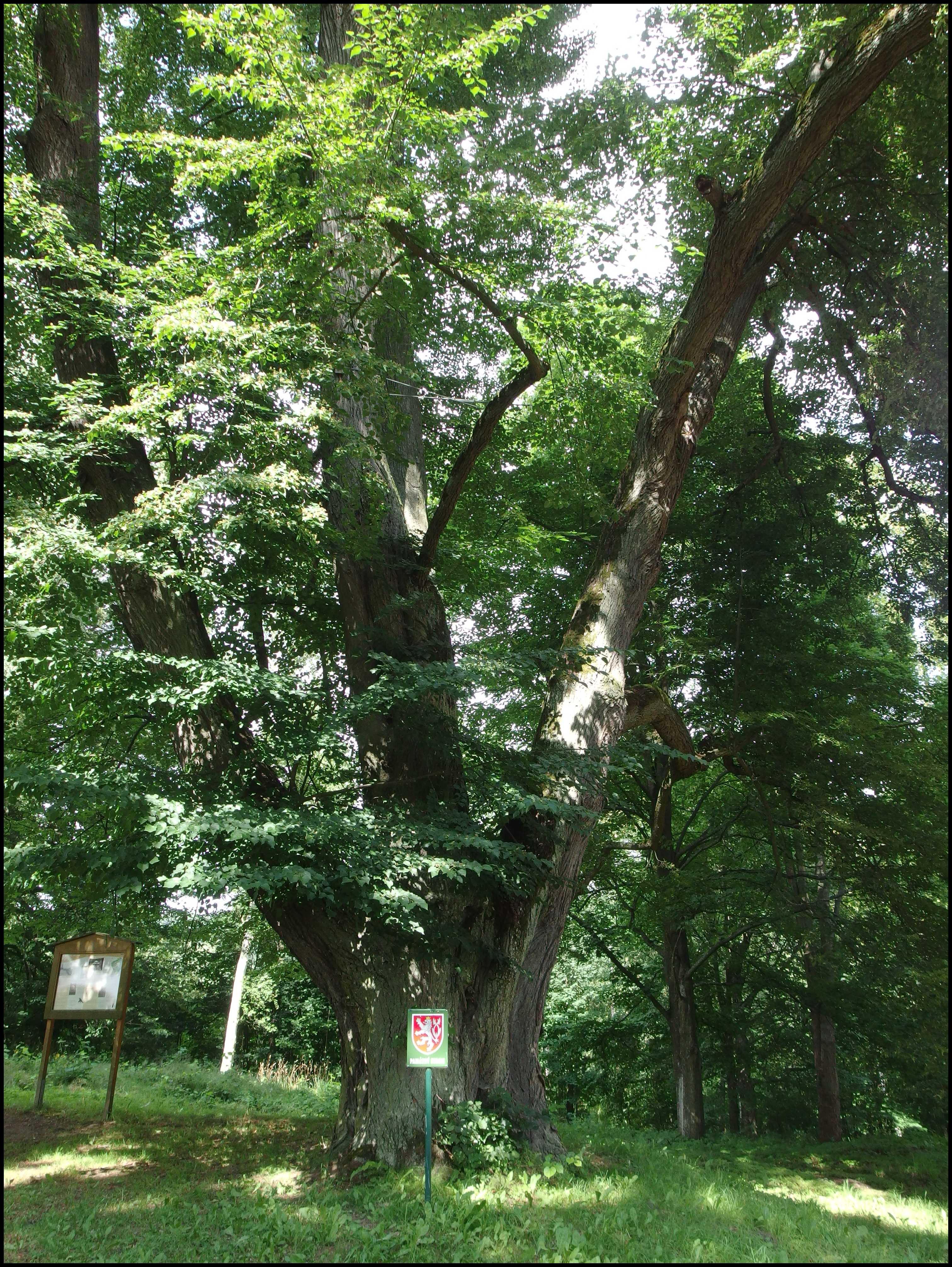 Lípa u kaple nad obcí Úterý.